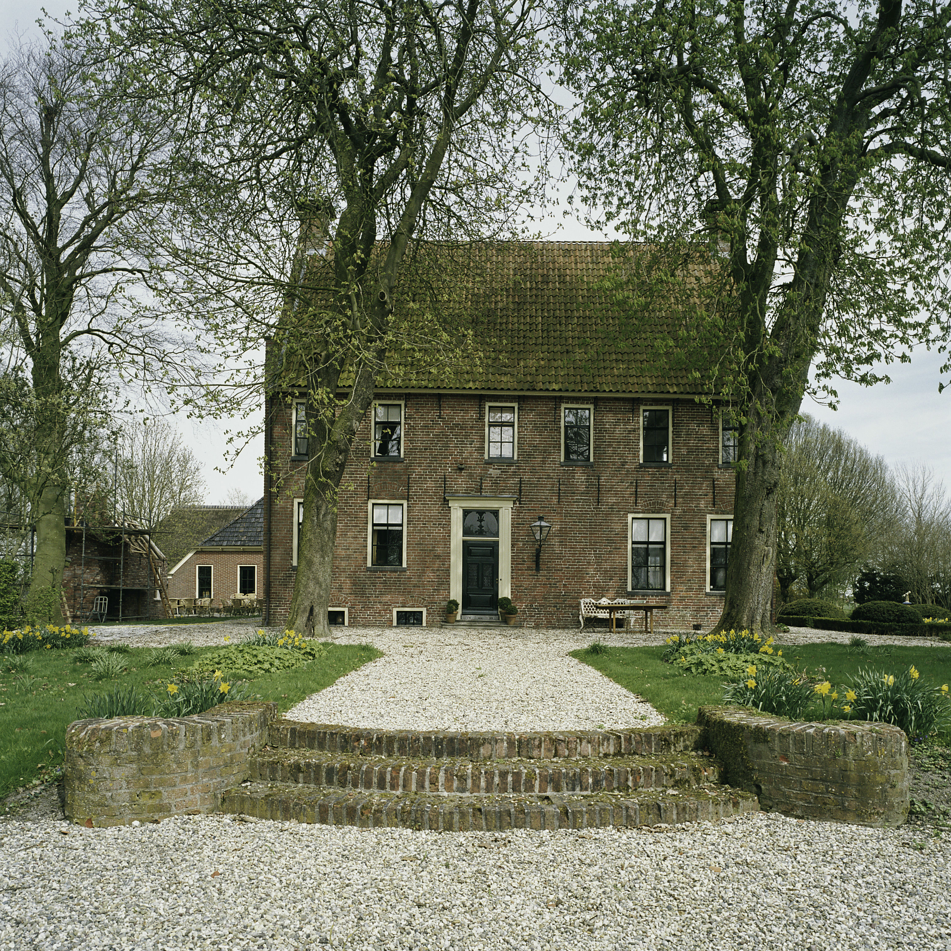 Hamster- of Piloursemaborg: Voorzijde met entree